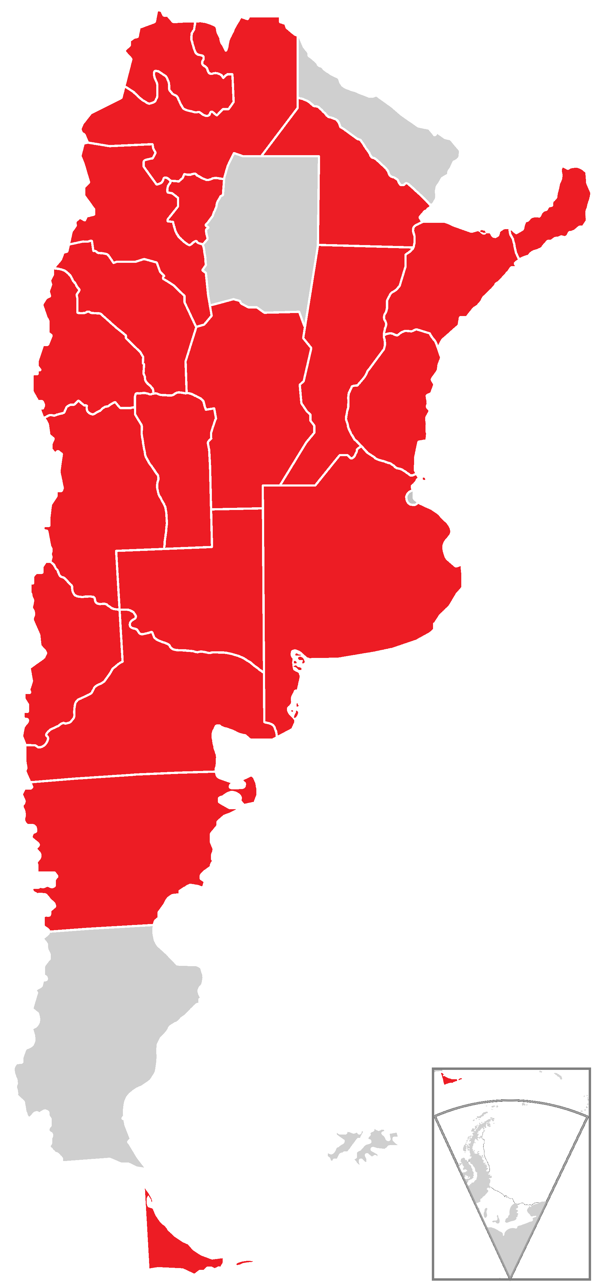 Mapa de los conflictos policiales y saqueos en Argentina de 2013. Sólo tres distritos no se vieron afectados: Capital Federal, Santa Cruz y Santiago del Estero.